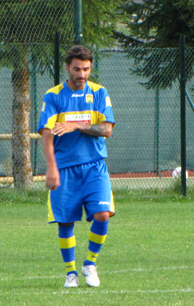 Antonio Di Nardo con la maglia dell'Ischia Isolaverde